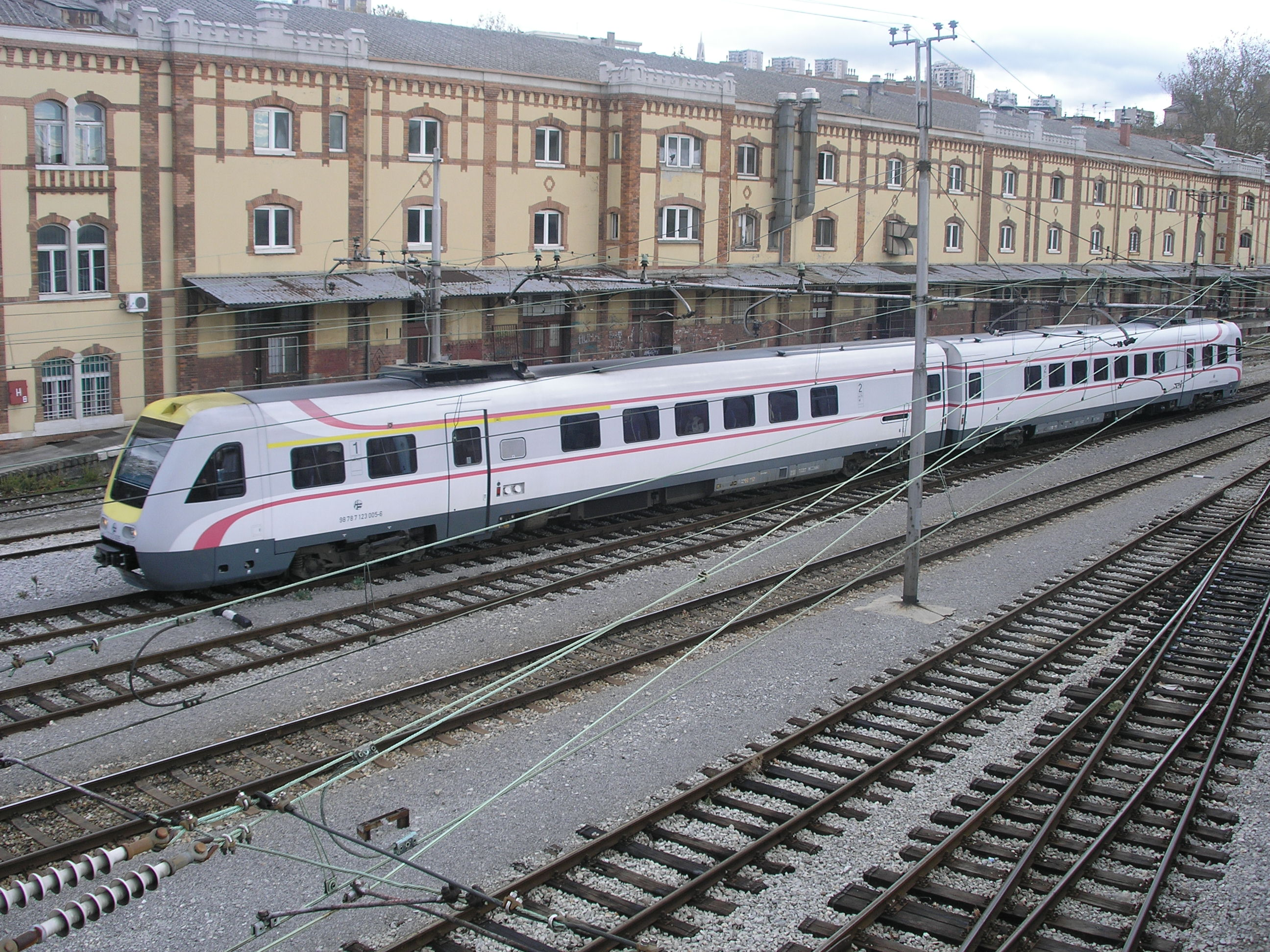 HŽ 7123 series DMU in Rijeka, Croatia